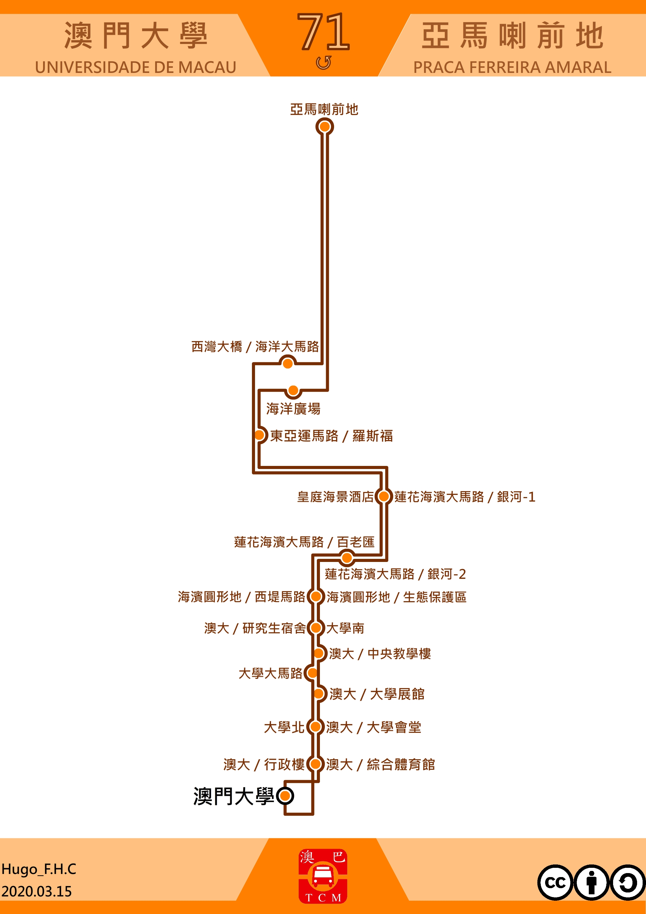 澳門巴士71走線圖